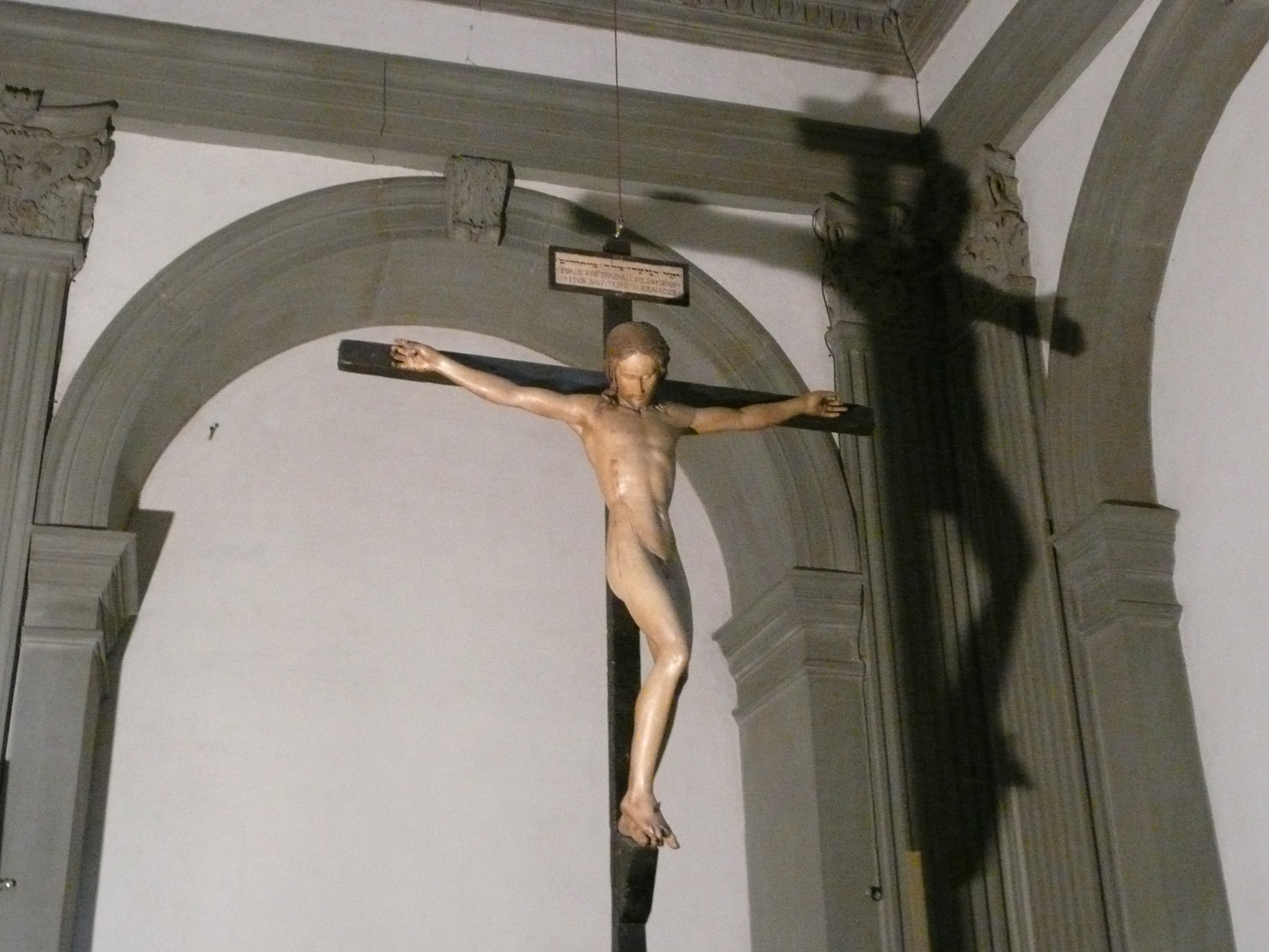 Sculpture de jeunesse, sacristie de la basilique Santo Spirito de Florence